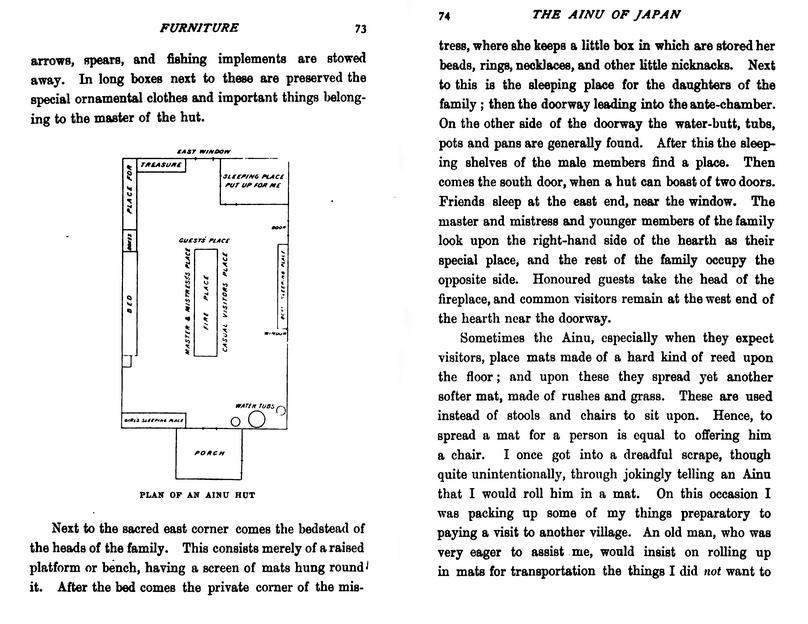 Dictionnaire de John Batchelor (1854-1944), The Ainu of Japan, 1892 ː plan de l'intérieur d'une maison Ainou.